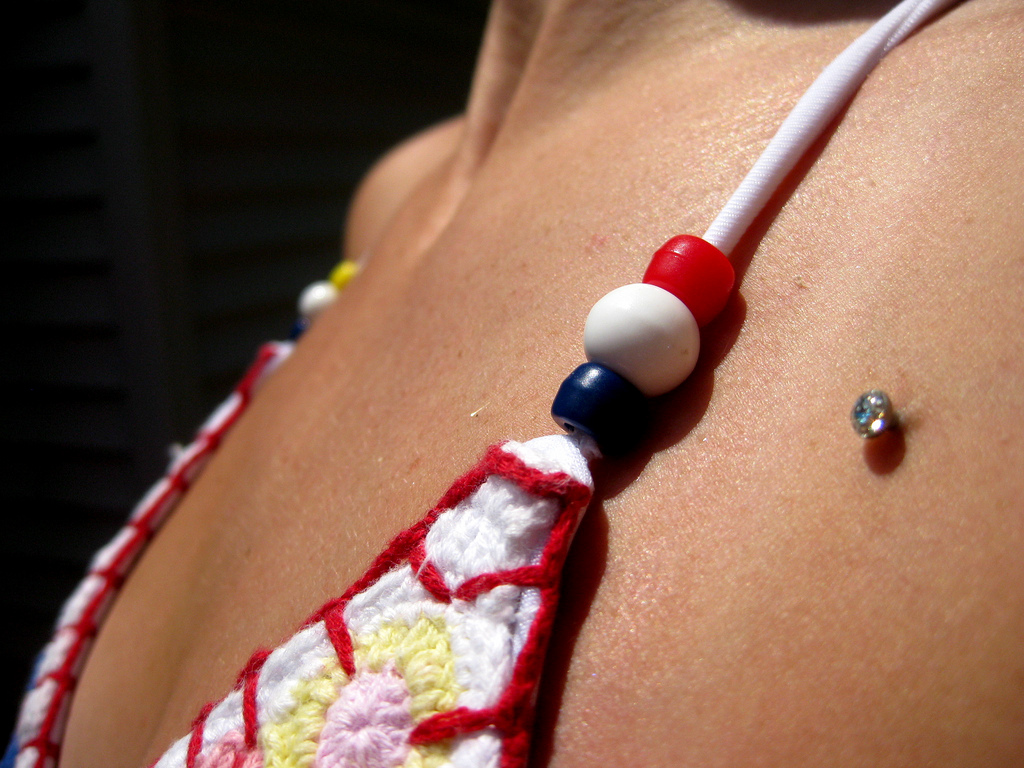 dermal